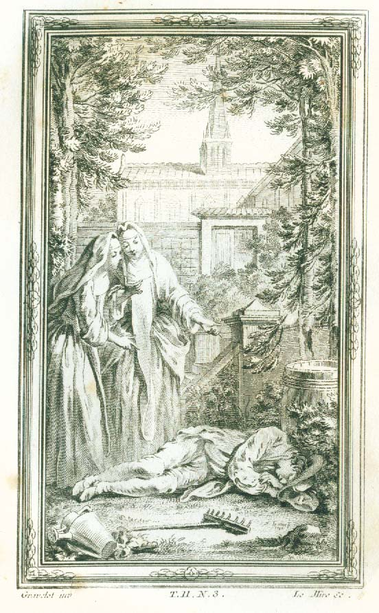 Decameron